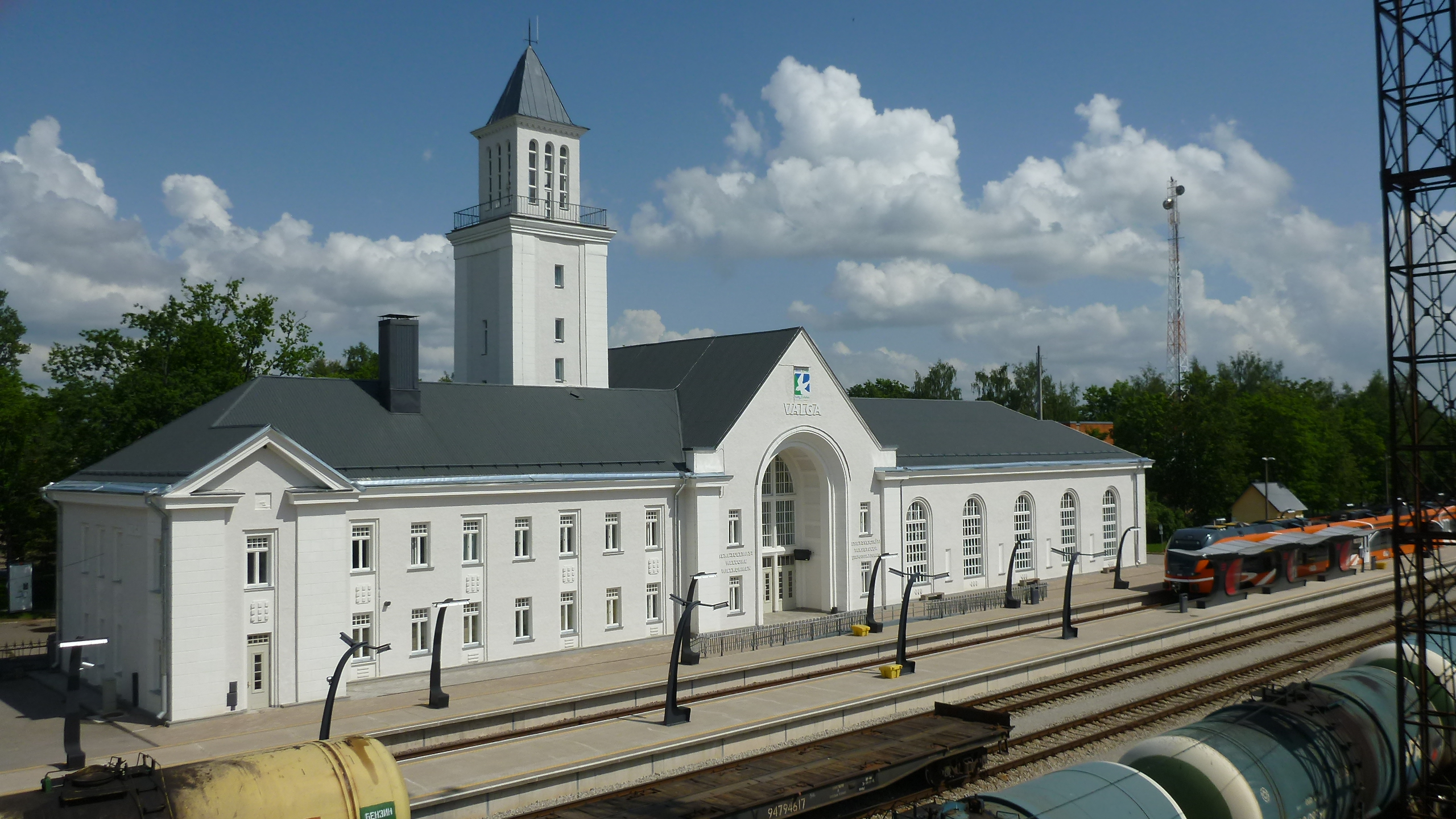 Valgan rautatieasema kesäkuussa